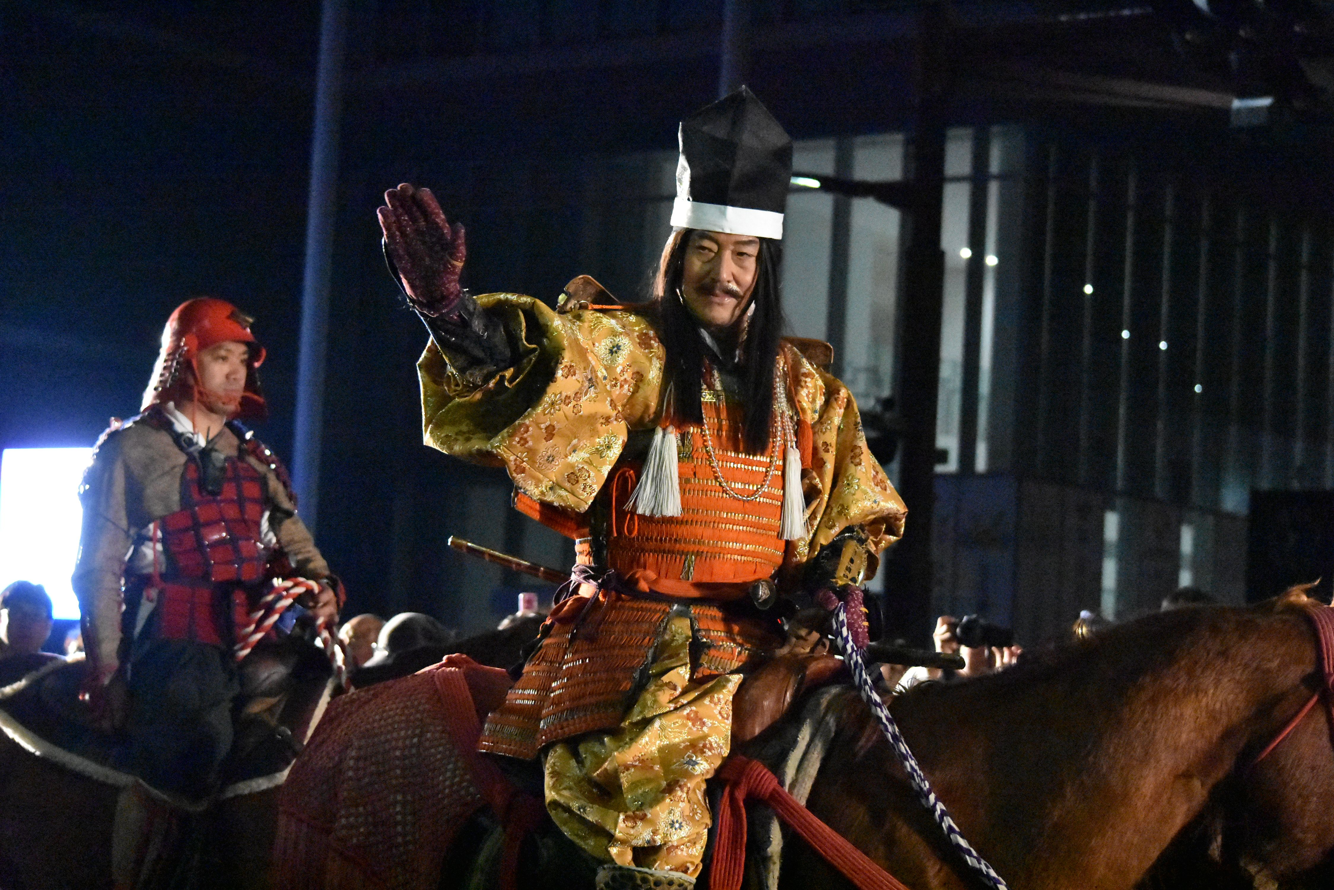 信玄公祭り 山下真司 Nikon D3400